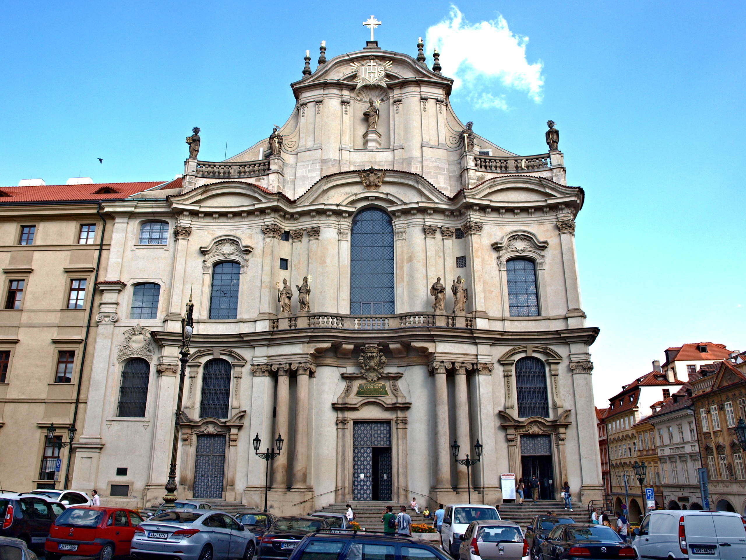 Kostel sv. Mikuláše na Malé Straně